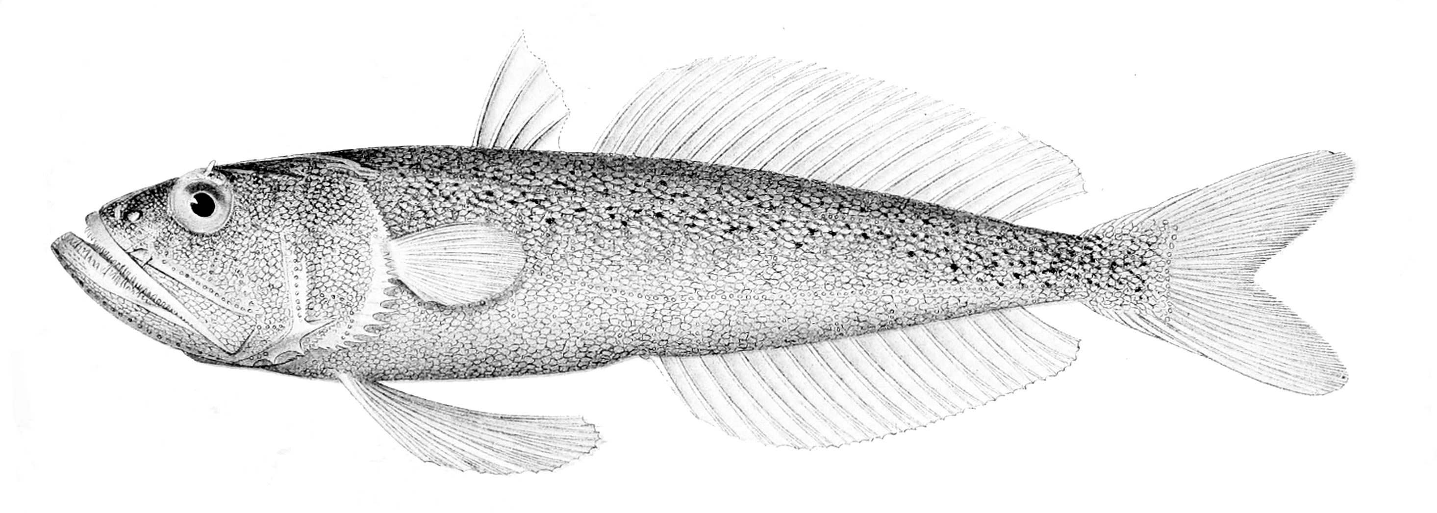 Champsodon fimbriatus